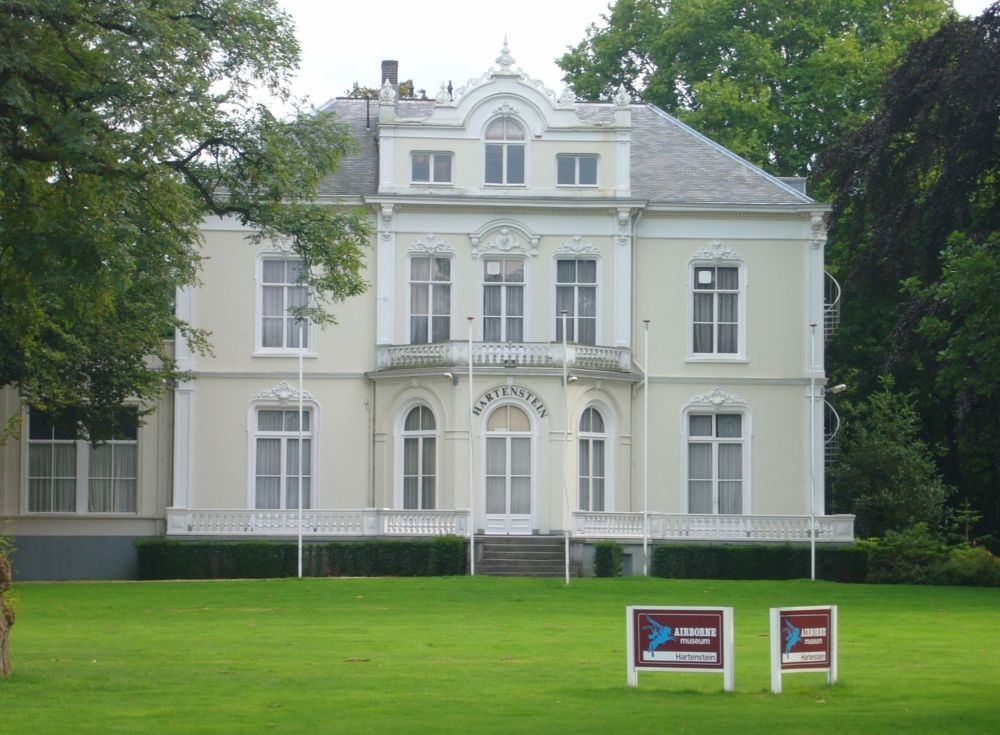 Airborne Museum in Oosterbeek (Netherlands)